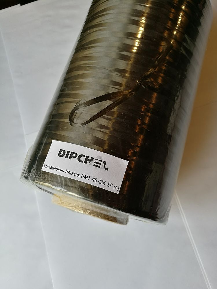 Углеволокно